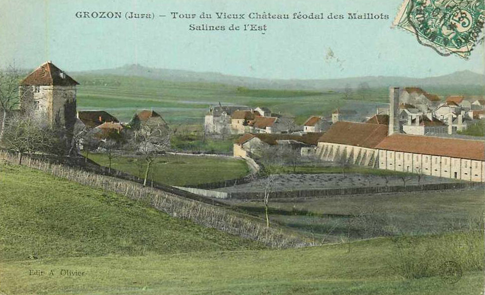 Vue générale de la saline de Grozon.